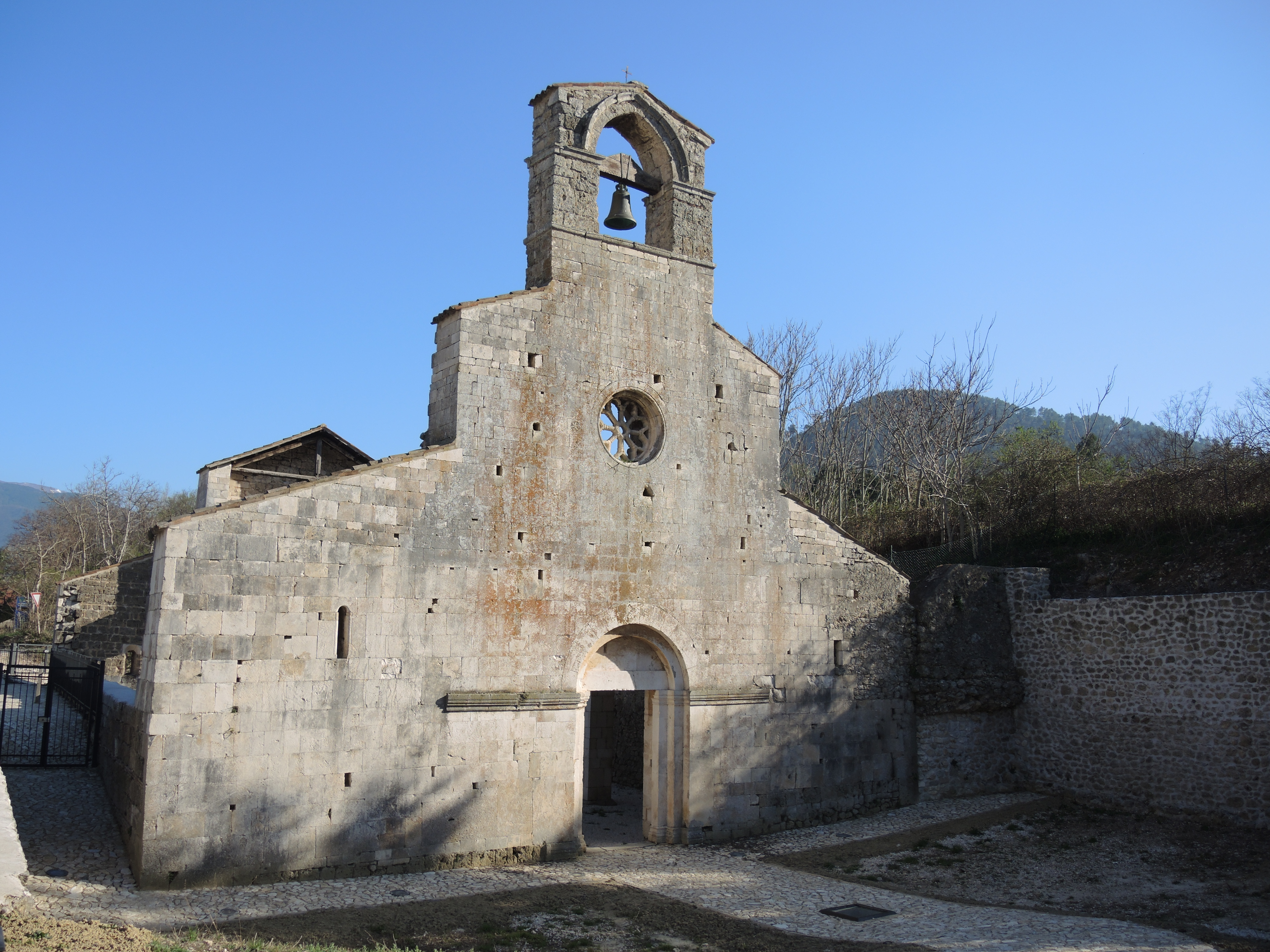 Bussi sul Tirino (PE): Santa Maria di Cartignano